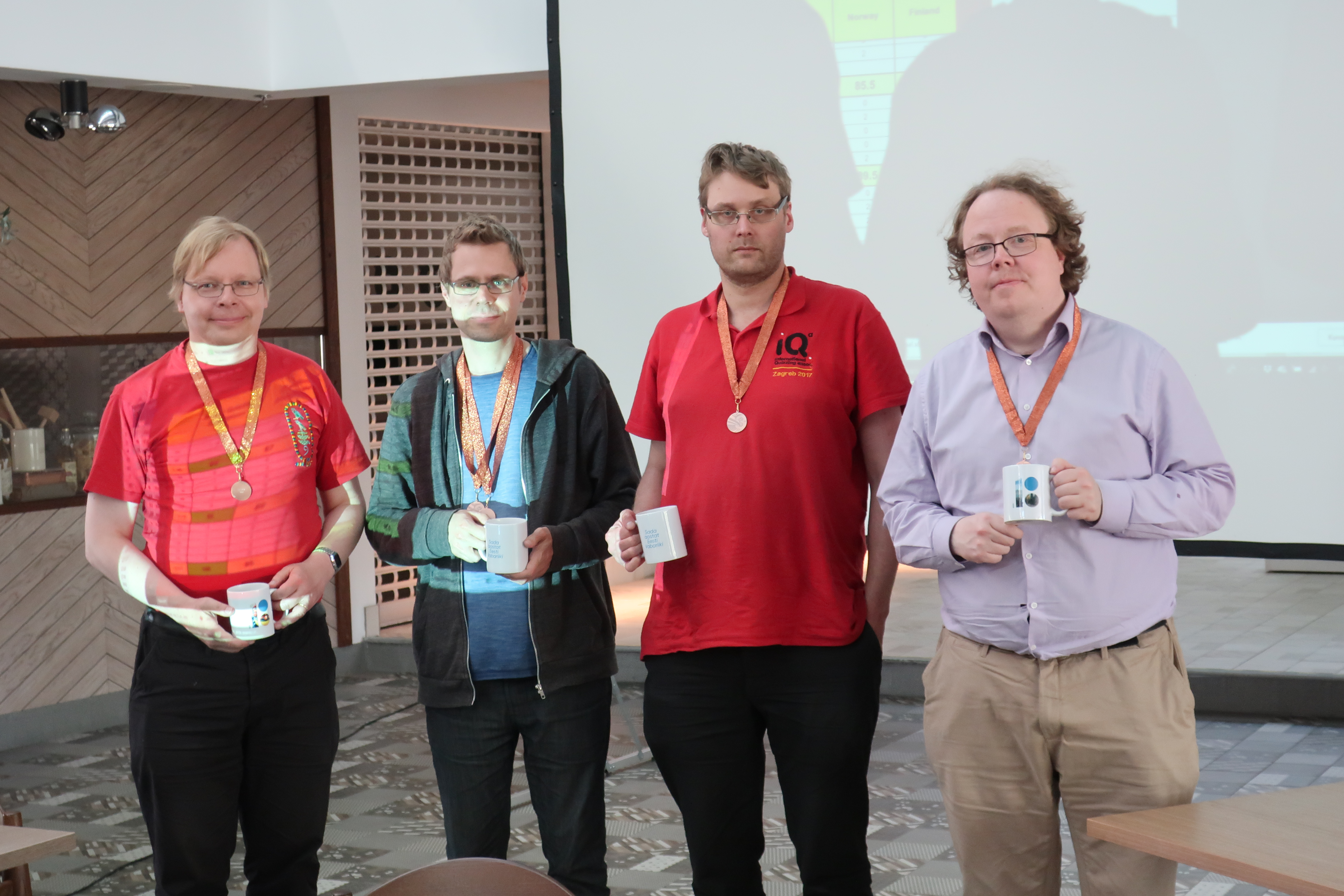 Tietokilpailun Pohjoismaiden-mestaruuskilpailut Tallinnassa 2018, Suomen pronssimitalijoukkue, vasemmalta Markku Virtanen, Tero Kalliolevo, Tuomas Tumi ja Jussi Suvanto.